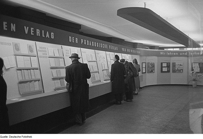 Original image description from the Deutsche Fotothek Messebesucher am Stand des Verlags Volk und Wissen